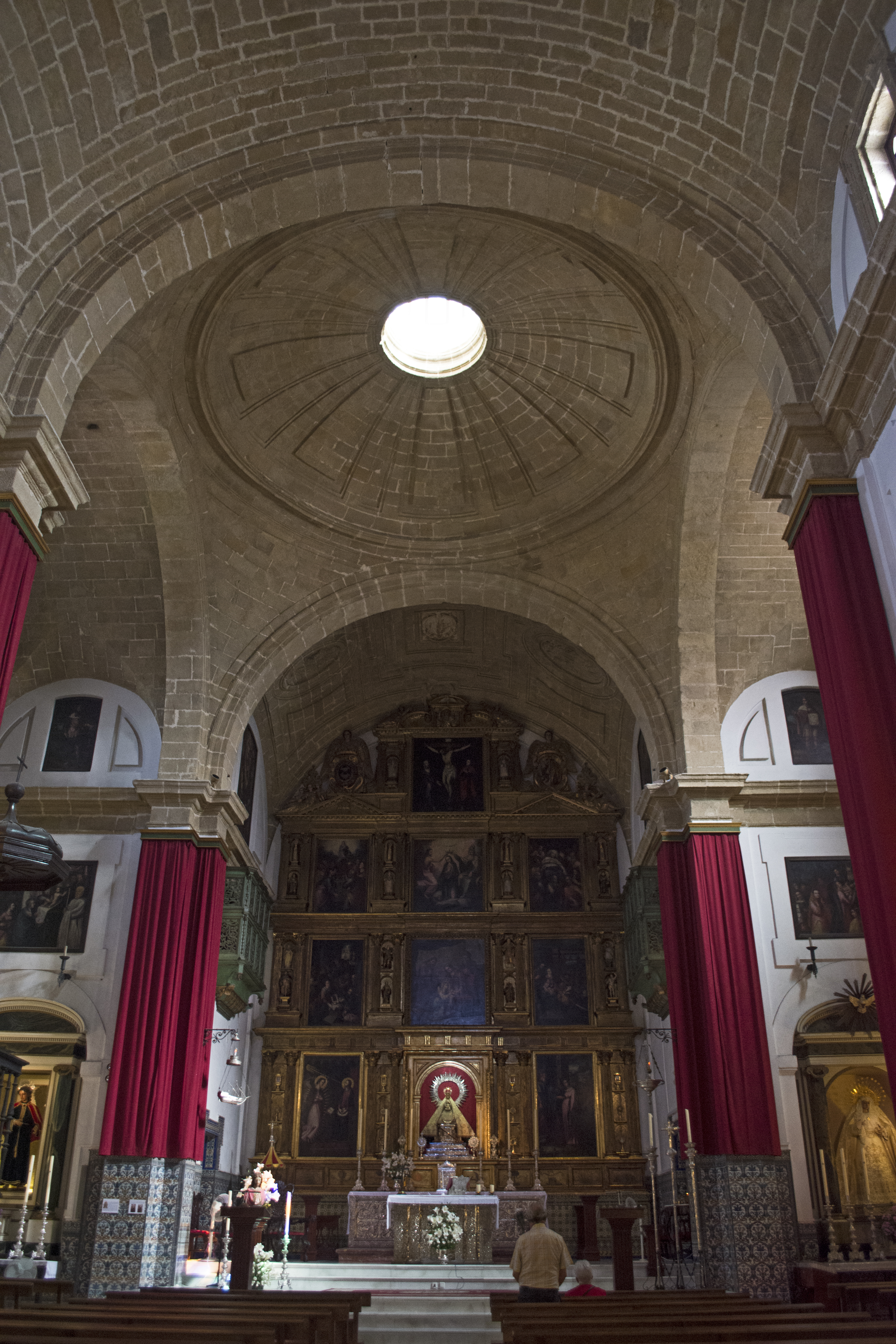 Interior de la basílica de Nuestra Señora de la Caridad, Sanlúcar de Barrameda. Arquitecto Alonso de Vandelvira